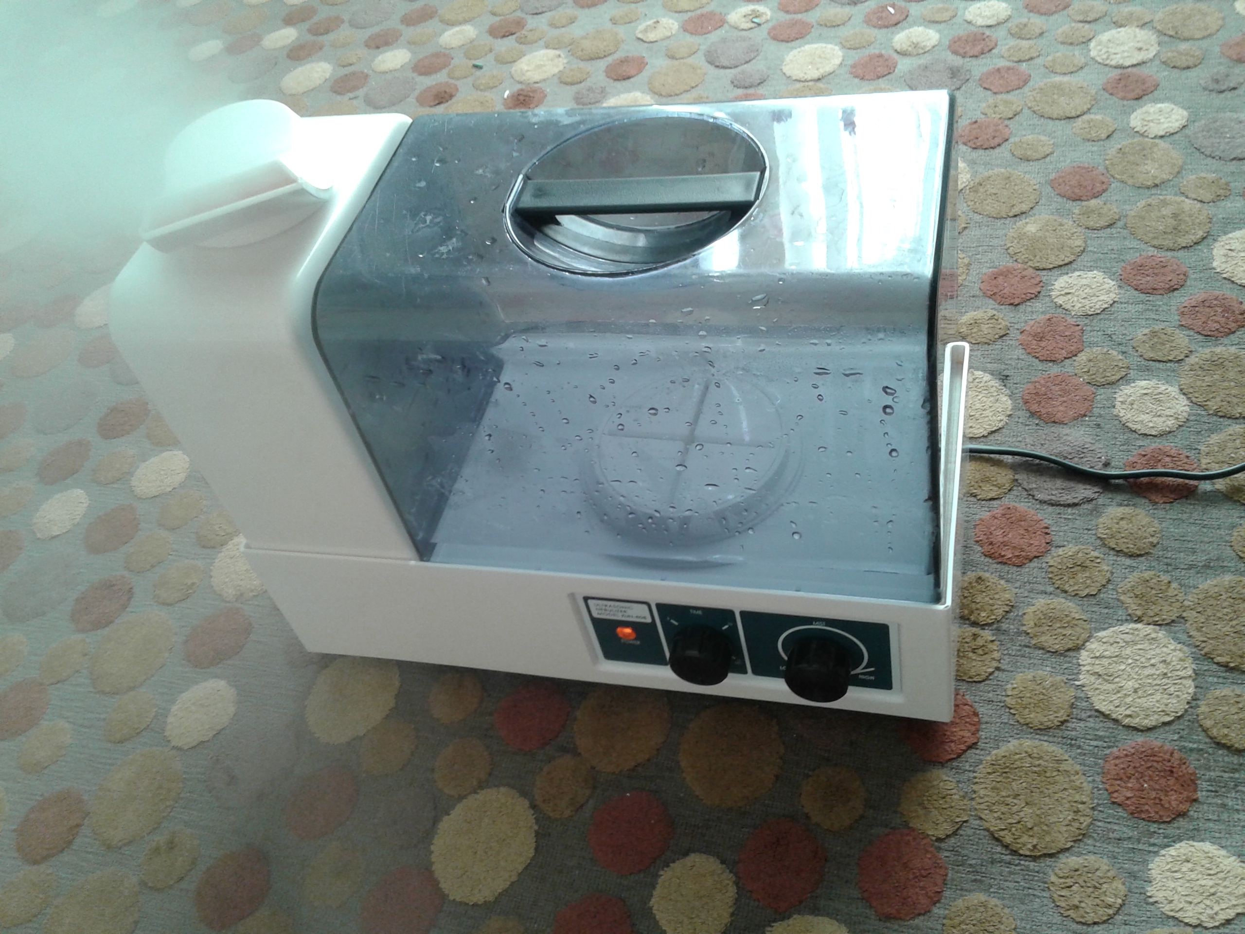 نگاره‌ای از دستگاه بخور سرد که به برق متصل و درحال کارکردن است.